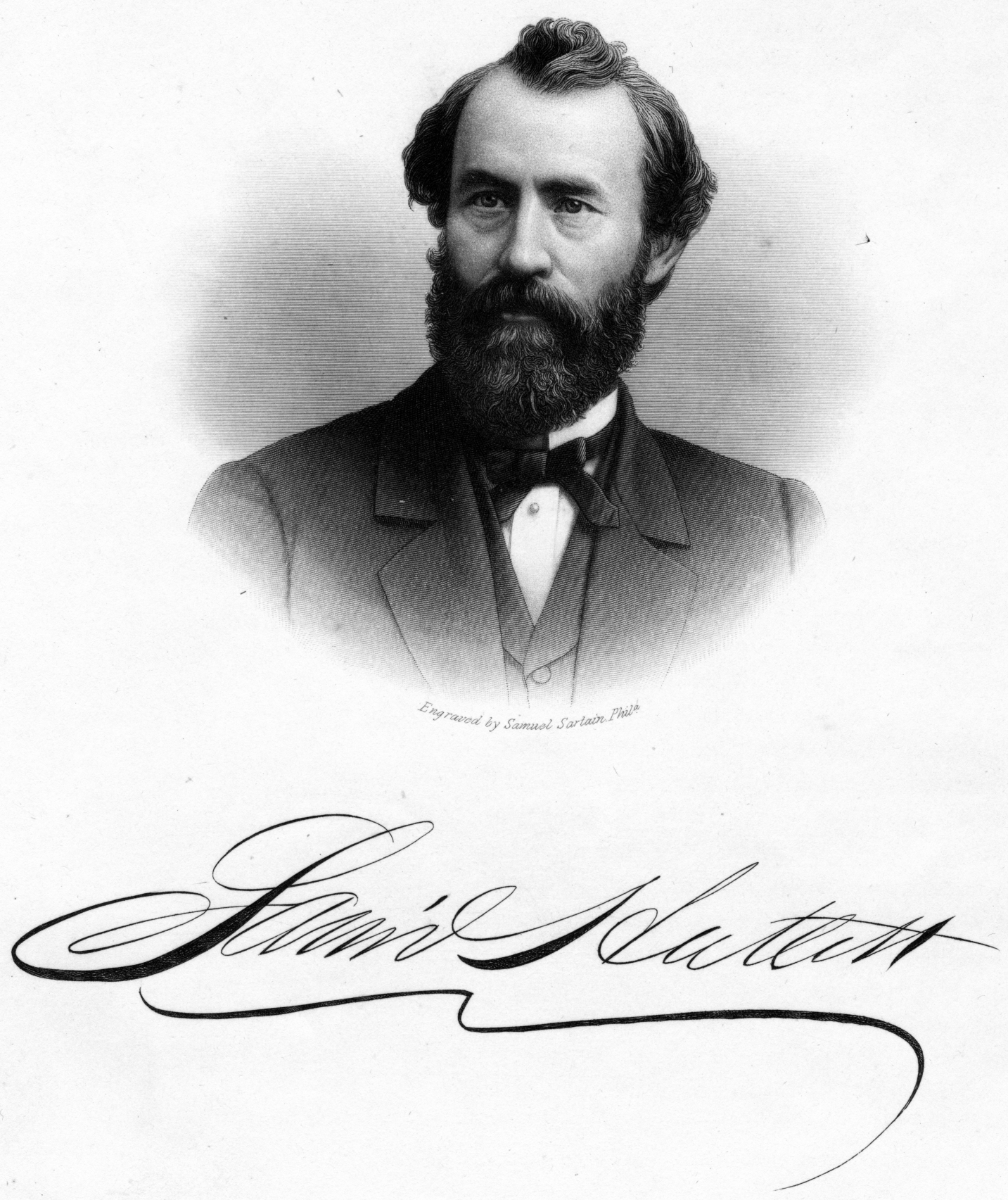 Engraving of Samuel Hallett